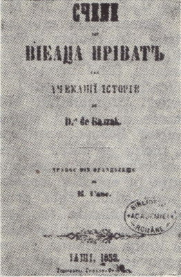 ”Scene din vieața privată sau aceeași istorie”, traducere publicată în 1852 a romanului ”Femeia de treizeci de ani” de Balzac